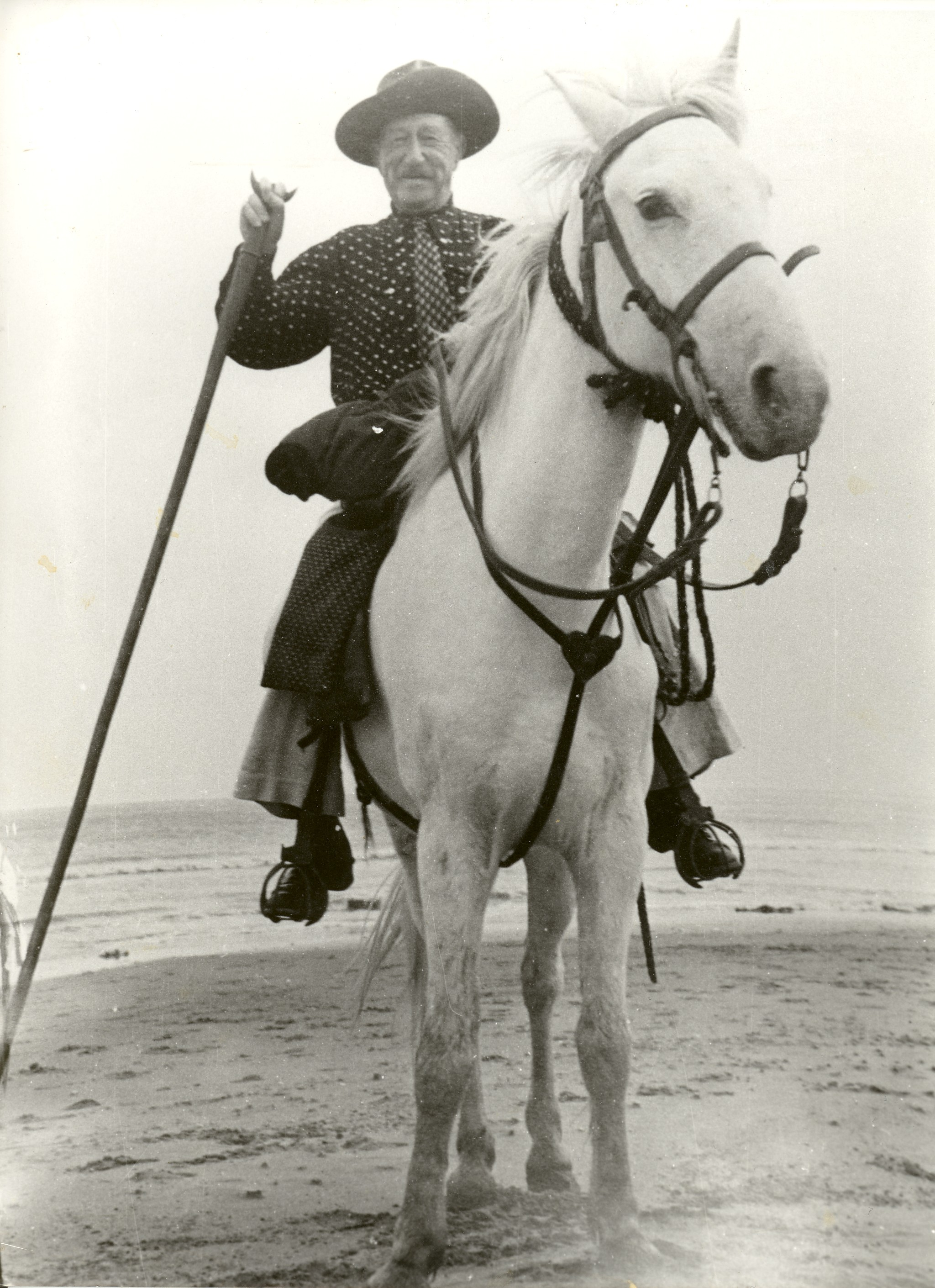 Cette photo m'a été gracieusement offerte par un habitant des Saintes-Maries-de-la-Mer, pour mon amour de la Camargue et de son histoire.